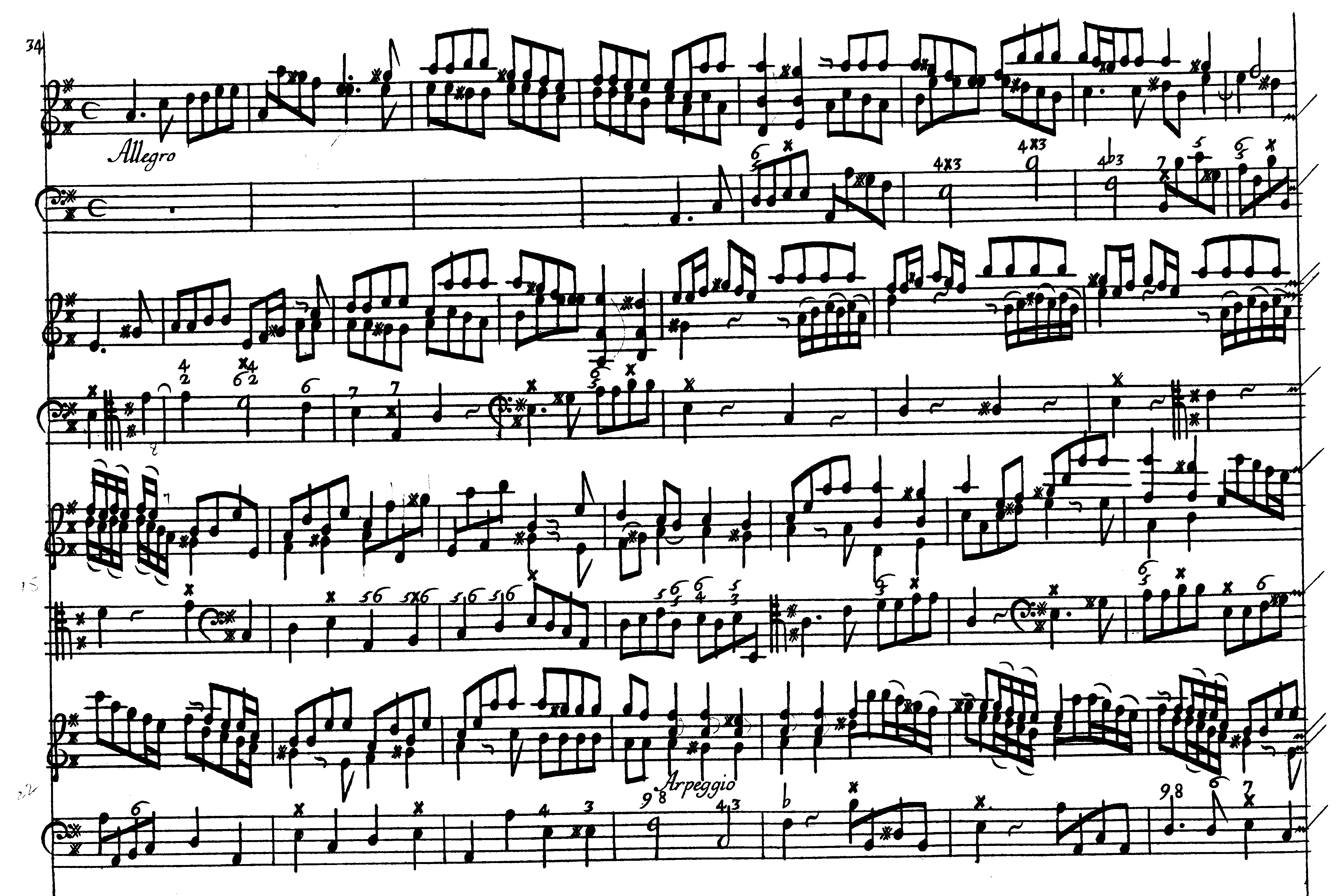 Página da Sonata op. 5. nº 6 de Arcangelo Corelli - Allegro